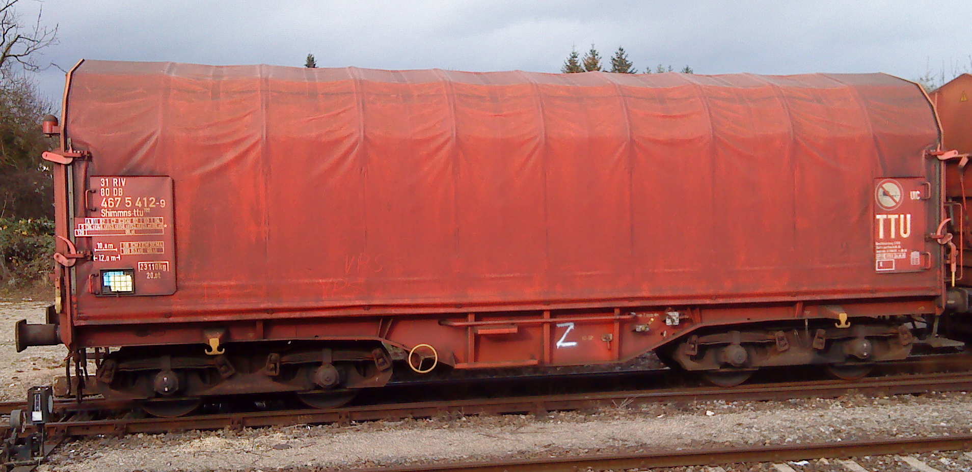 Vierachsiger Flachwagen der DB für den Transport von Coils, aufgenommen im Bahnhof Günzburg